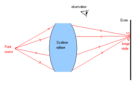 Schéma : système optique donnant une image réelle (schéma personnel) Catégorie:Schéma de physique